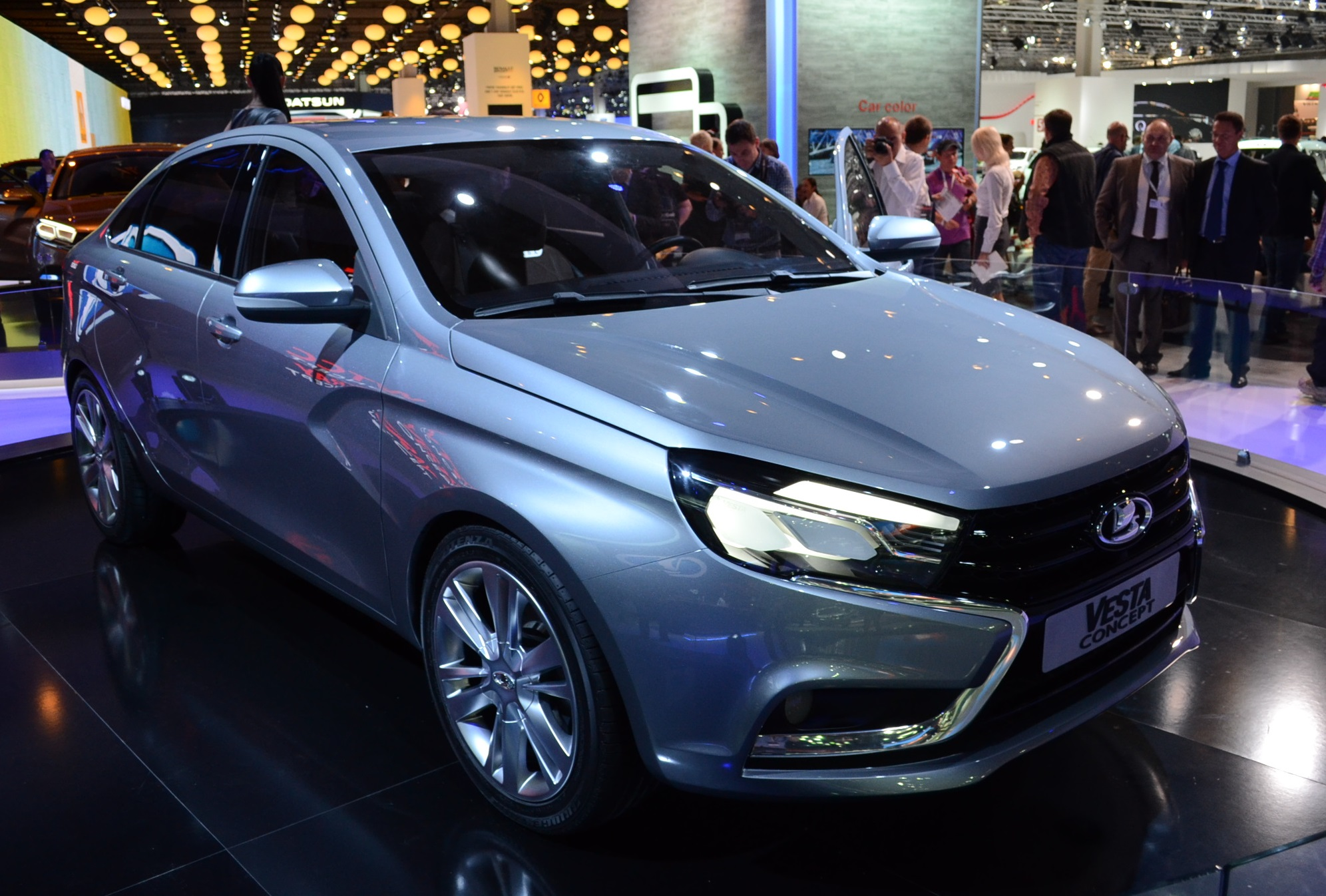 Концепт-кар Lada Vesta